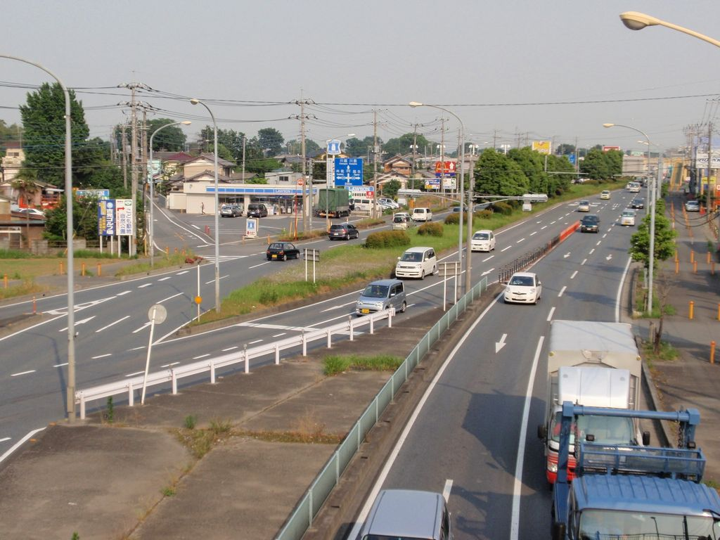 国道２５４号 東松山市柏崎Ｙ字路